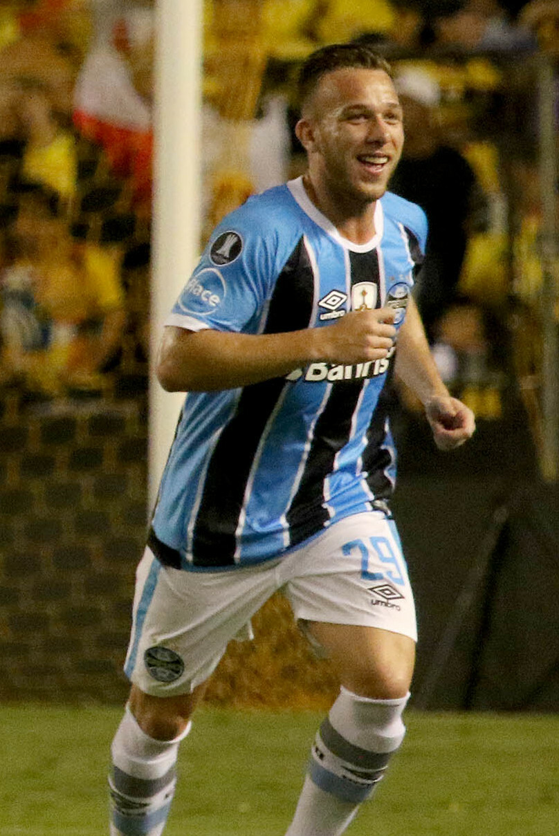 Guayaquil 25 de octubre del 2017 (Andes).- En el estadio Monumental, Barcelona se enfrenta a Gremio de Porto Alegre en el partido de ida por la semifinal de la Copa Libertadores 2017 Foto:Andes/César Muñoz